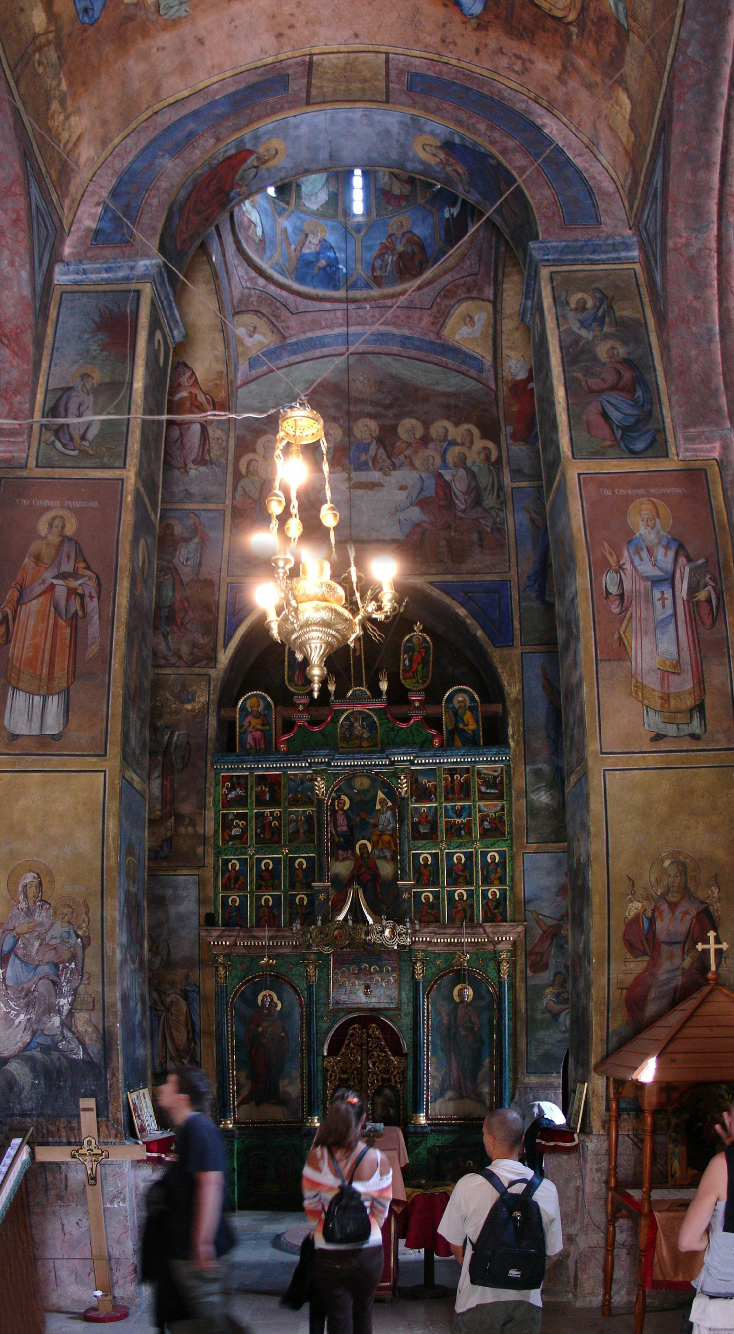 Vue intérieure du monastère de Rača, Serbie